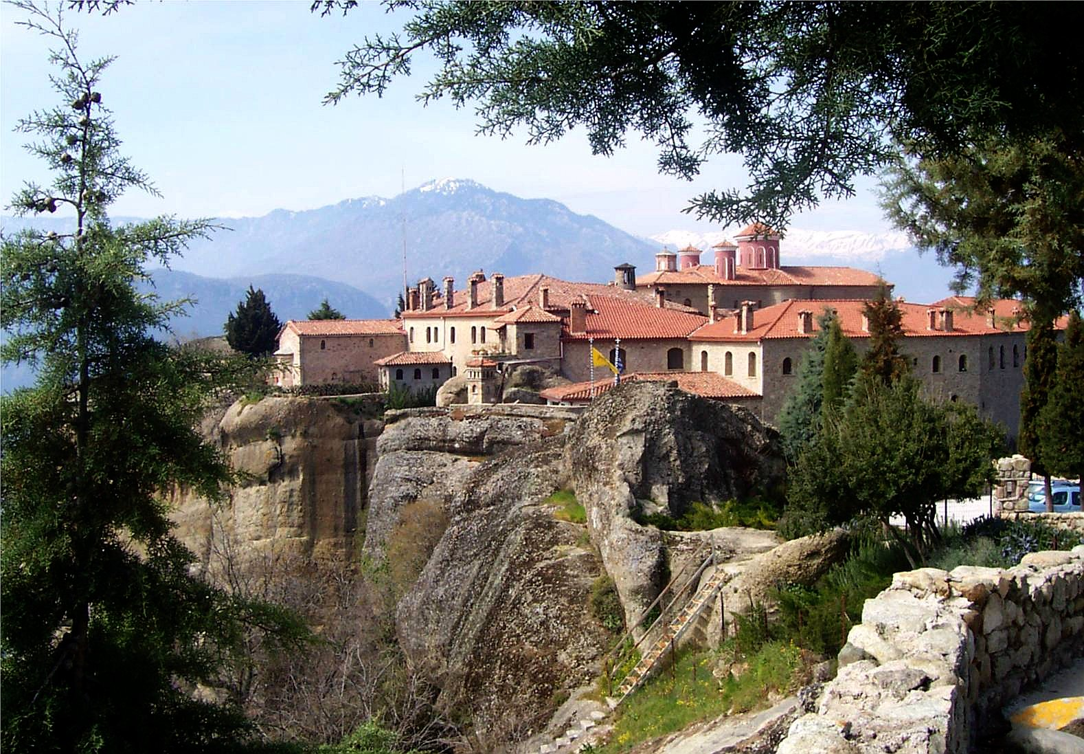 Foto Sofie Debognies April 2005